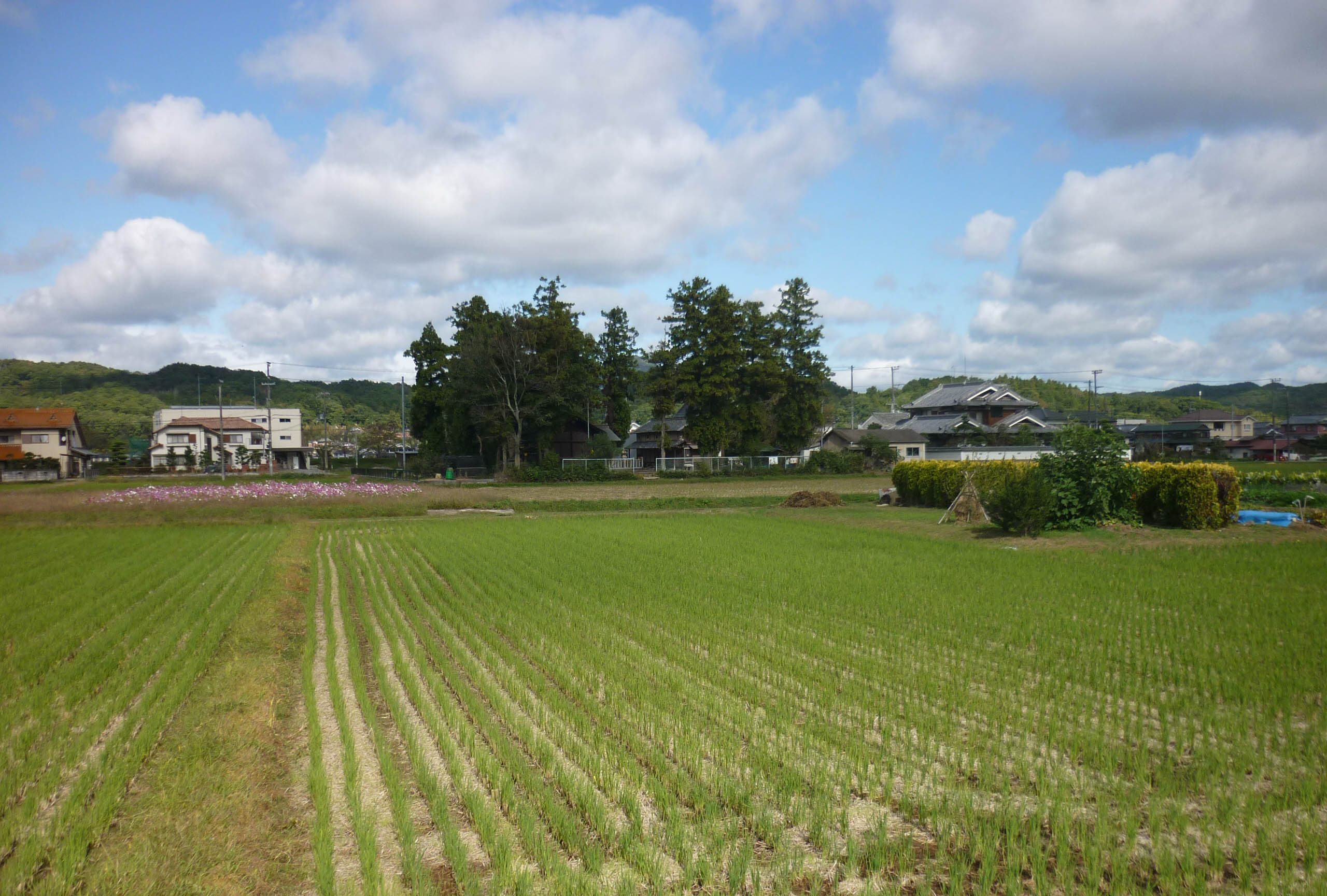 下田中城周辺